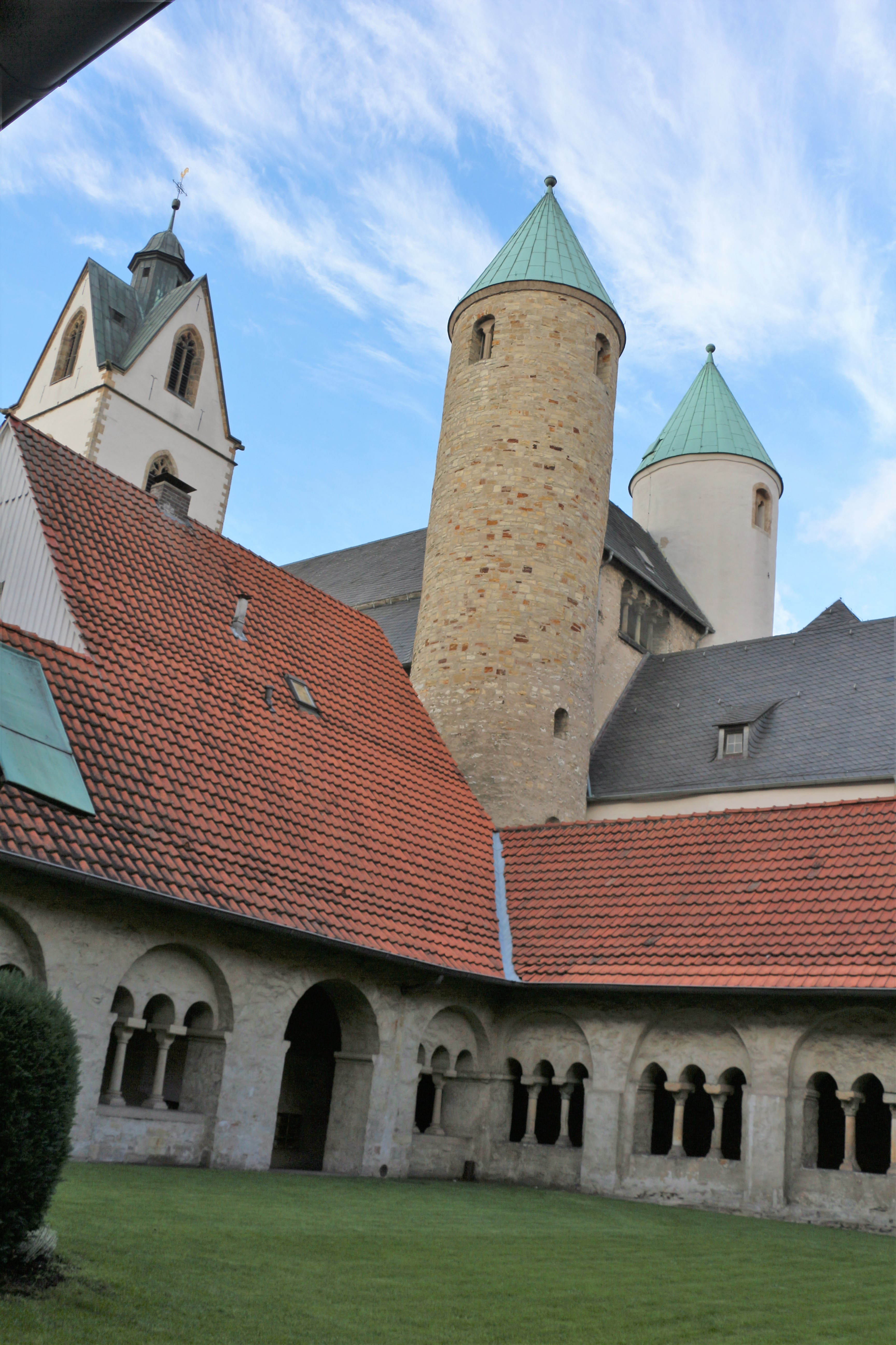 Blick auf die Türme der Busdorfkirche vom Kreuzgang ausThis is a photograph of an architectural monument., no. 2